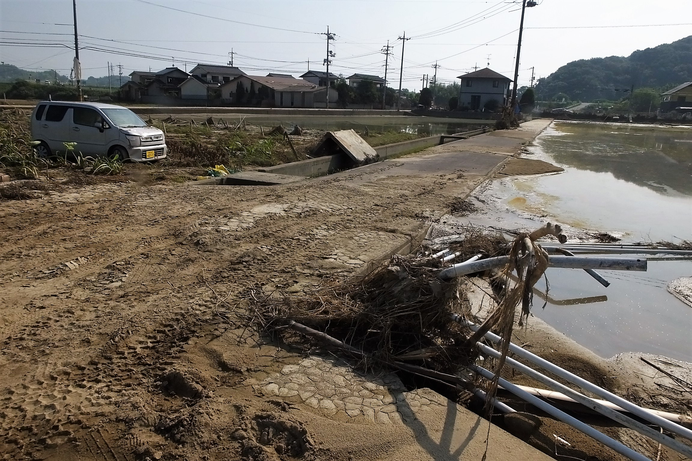 2018-07-14 Floods of Mabi, Kurashiki City 倉敷市真備 平成30年7月豪雨被害